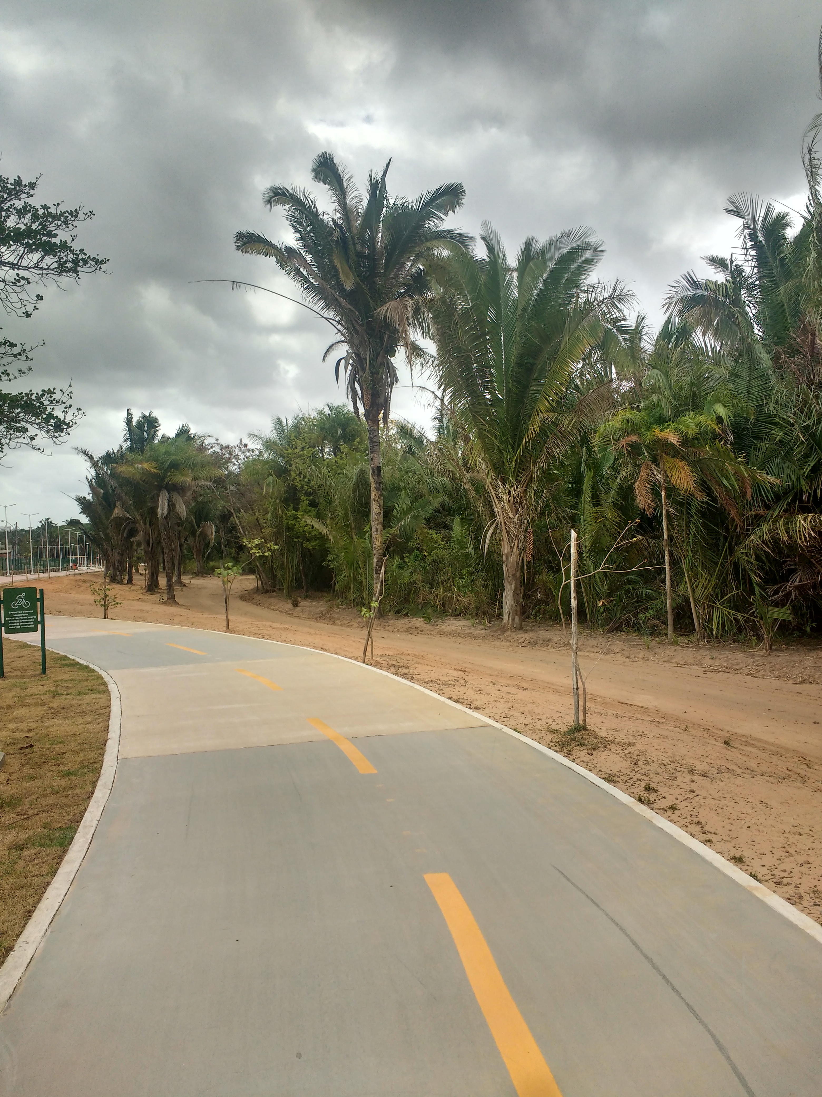 Parque Estadual do Rangedor